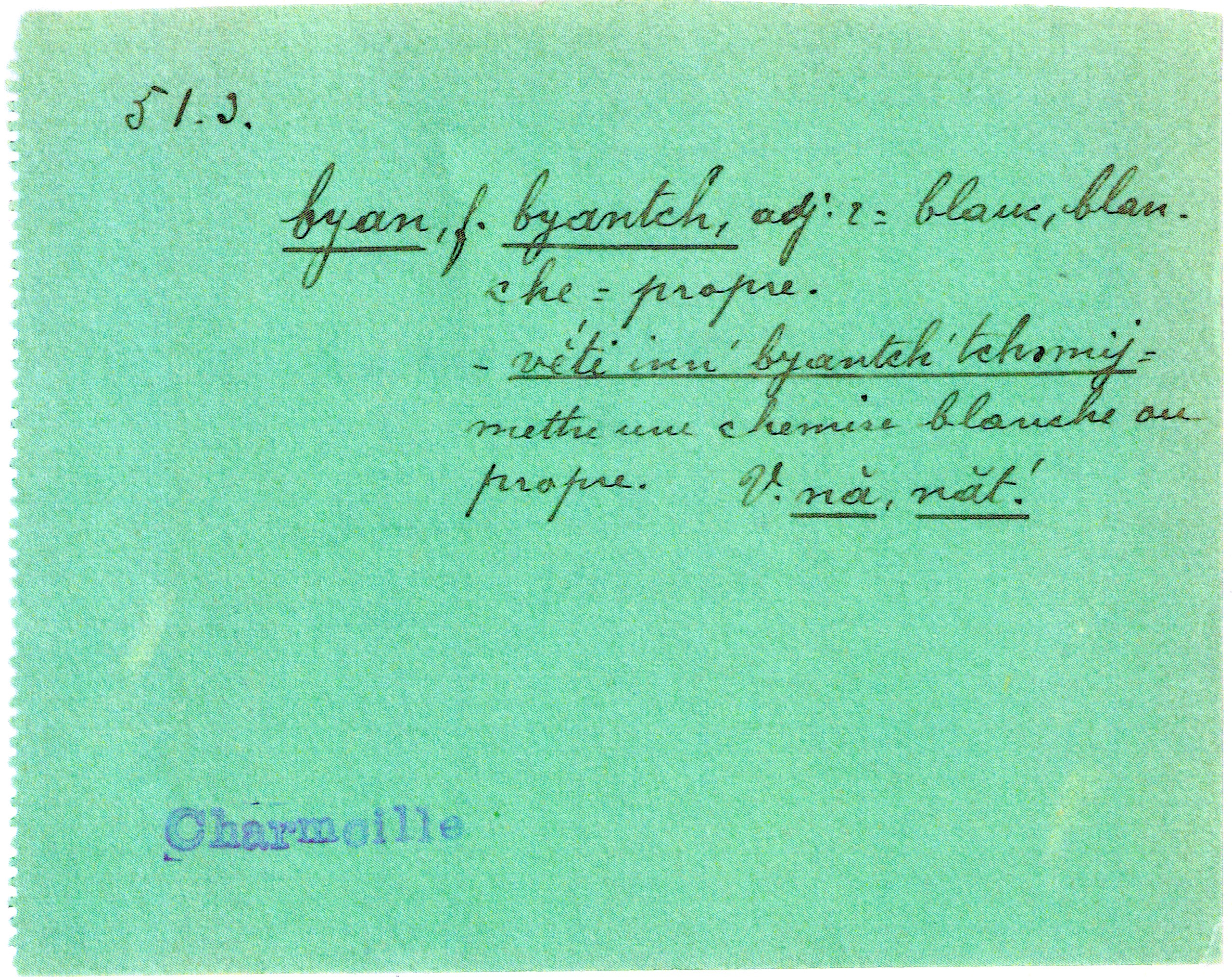 Une fiche « correspondant » du Glossaire des patois de la Suisse romande. Enquête lexicographique 1900-1910. Le mot « blanc » décrit par un patoisan de Charmoille, avec l'exemple : « Mettre une chemise blanche au propre ».